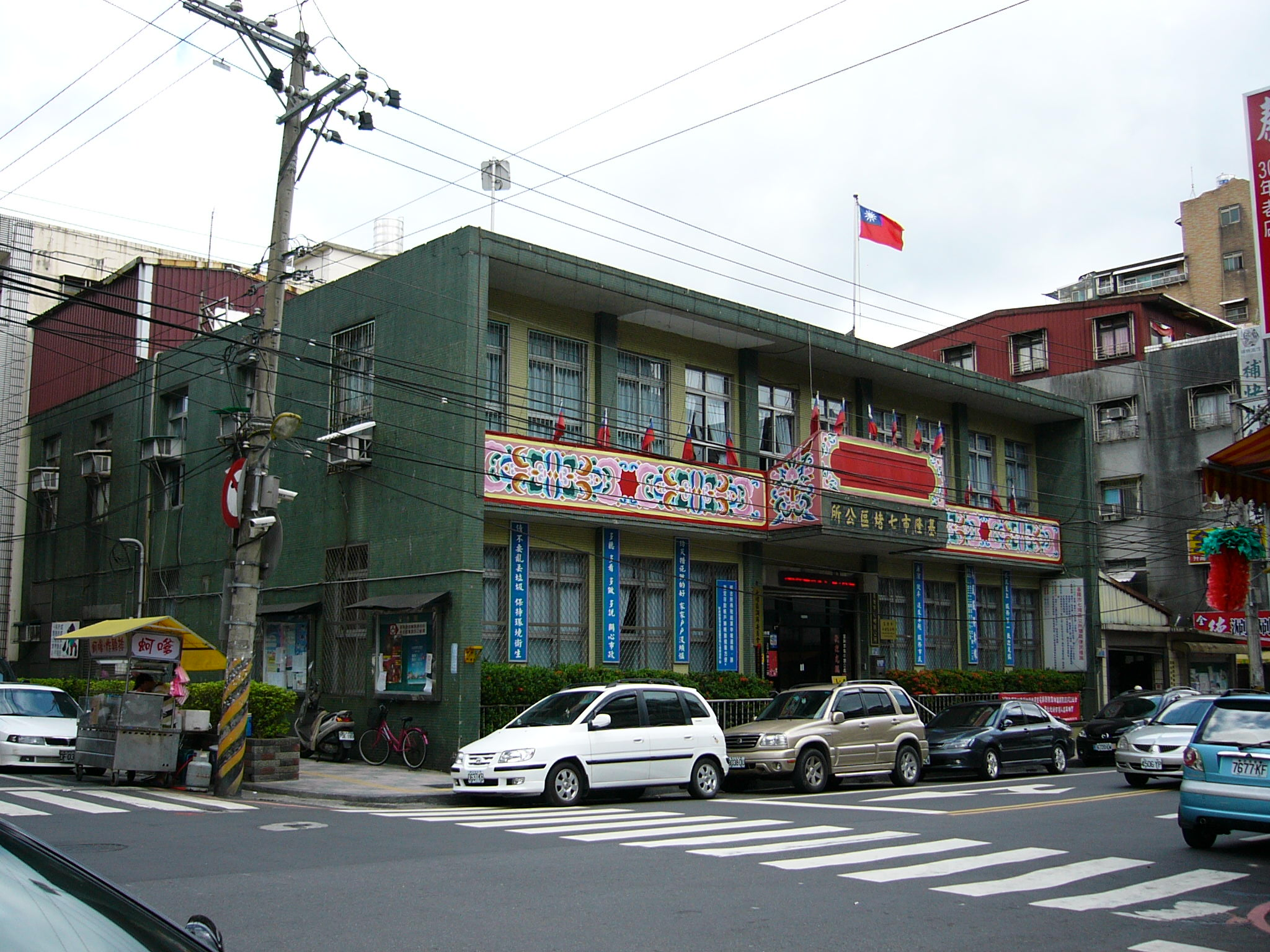 中文（台灣）: 基隆市七堵區公所，頂樓懸掛中華民國國旗。